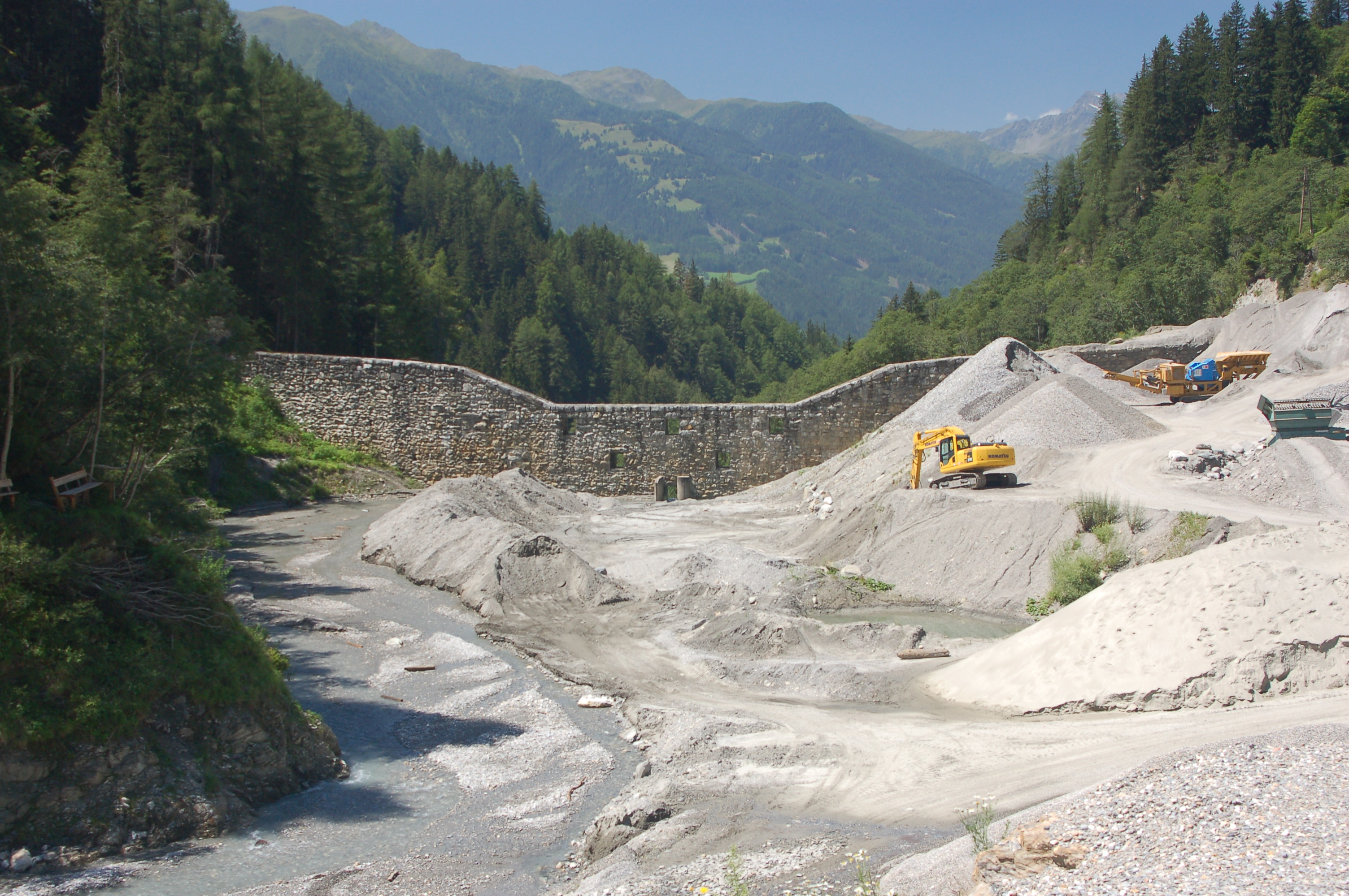 Blick von Westen auf die Kalkofensperre des Bretterwandbachs in der Gemeinde Matrei in Osttirol, Bezirk Lienz.